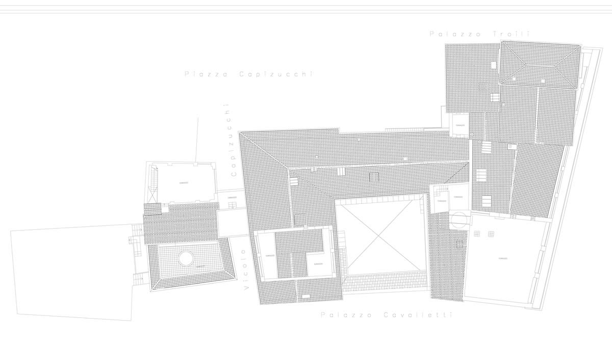 Pianta dall'alto del Palazzo Albertoni spinola